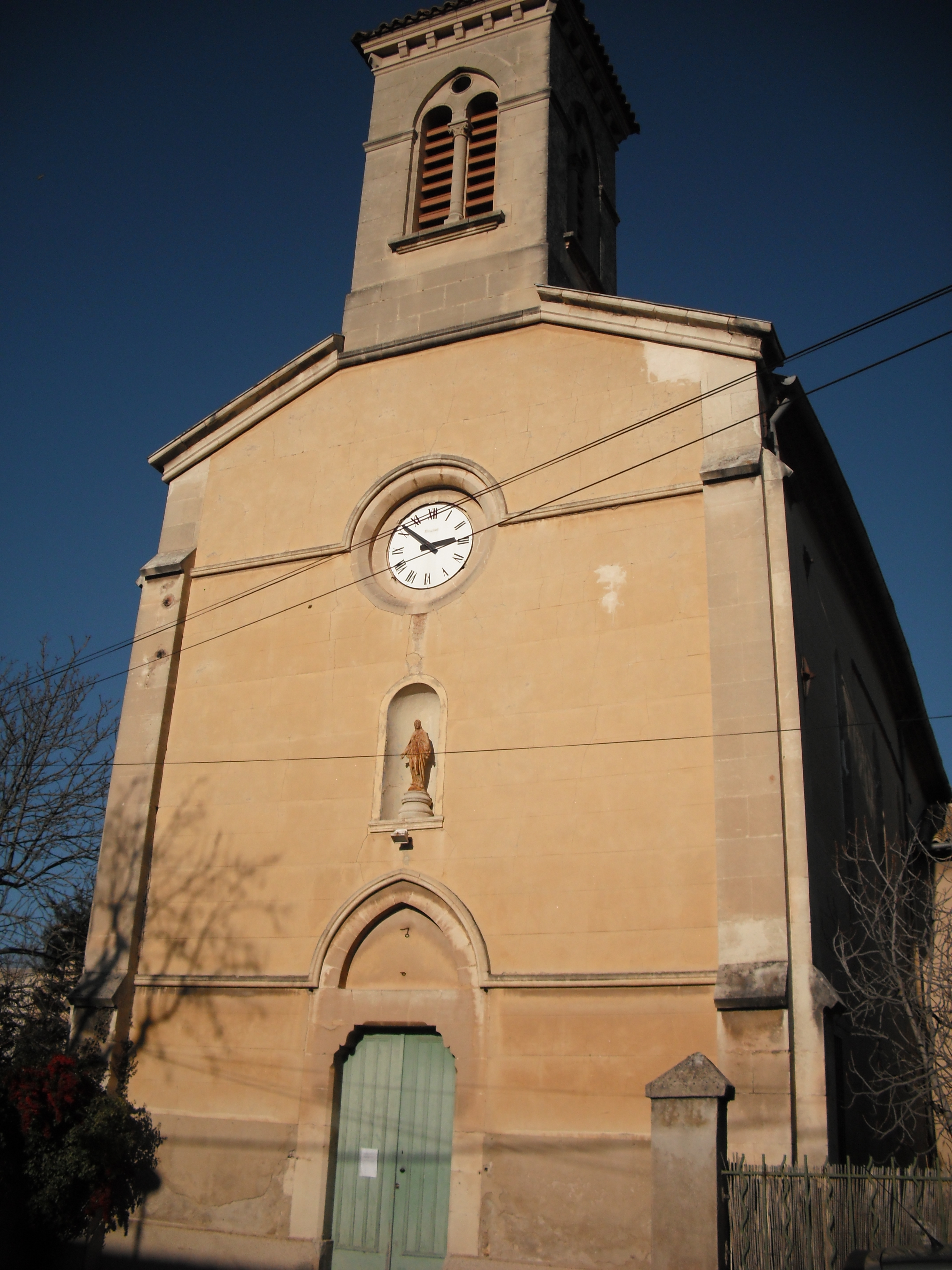 Église de Luynes, Bouches-du-Rhône, près d'Aix-en-Provence.